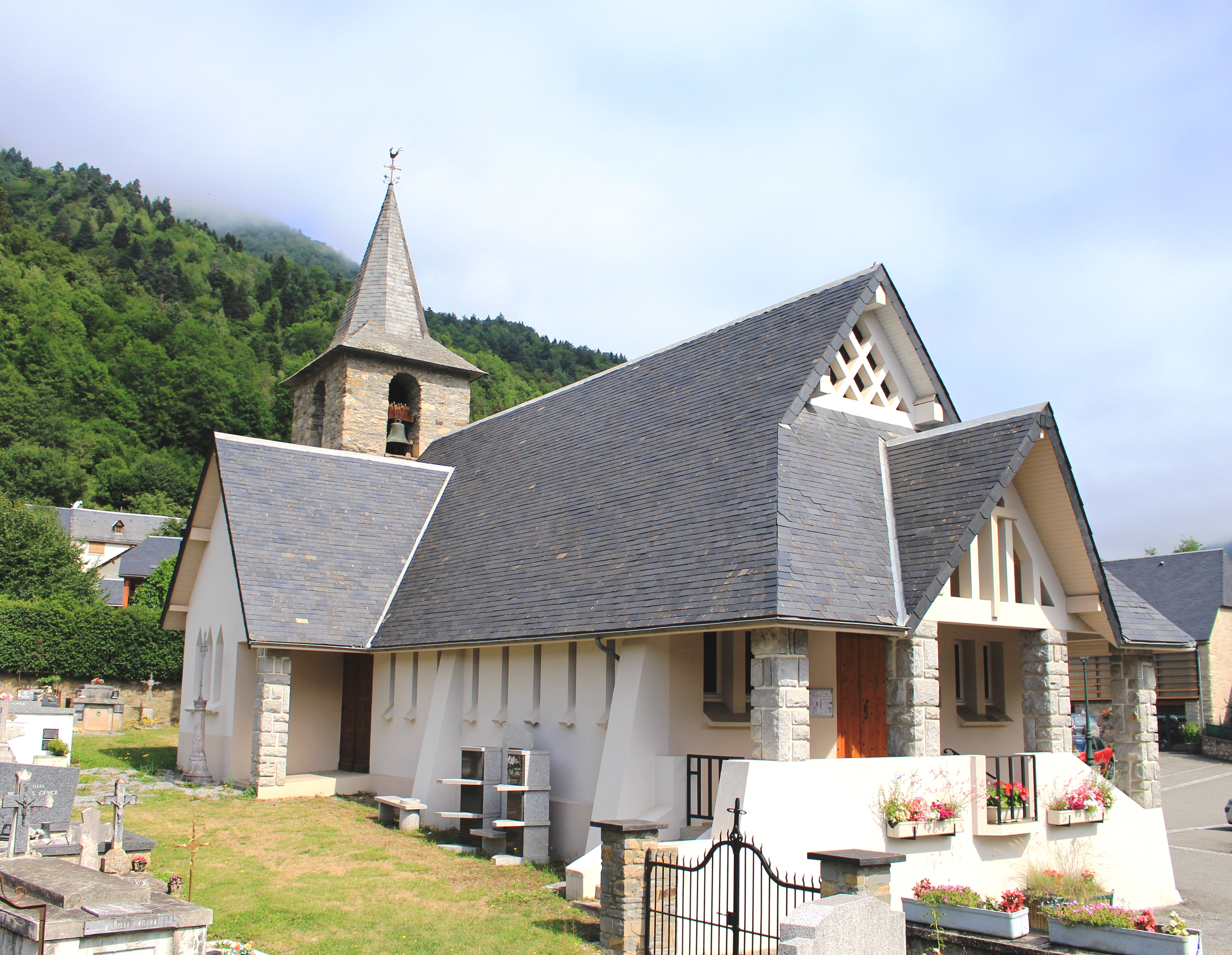 Église Saint-Blaise d'Avajan (Hautes-Pyrénées)